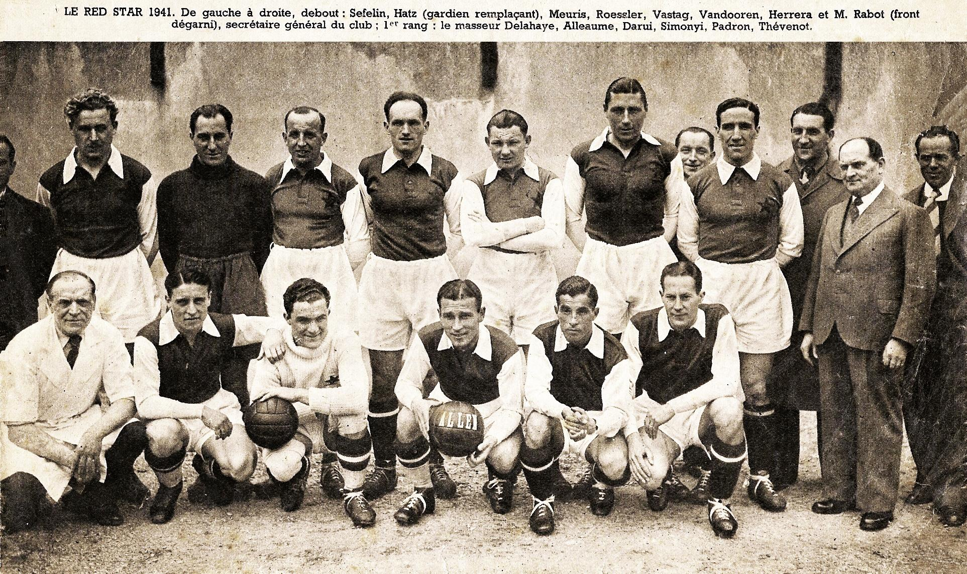 Le Red Star 1941 . De gauche à droite, debout : Sefelin, Hatz (gardien remplaçant), Meuris, Vastag, Vandooren, Herrera et M. Rabot (front dégarni), secrétaire général du club ; 1er rang : le masseur Delahaye, Alleaume, Darui, Simonyi, Padron, Thévenot.